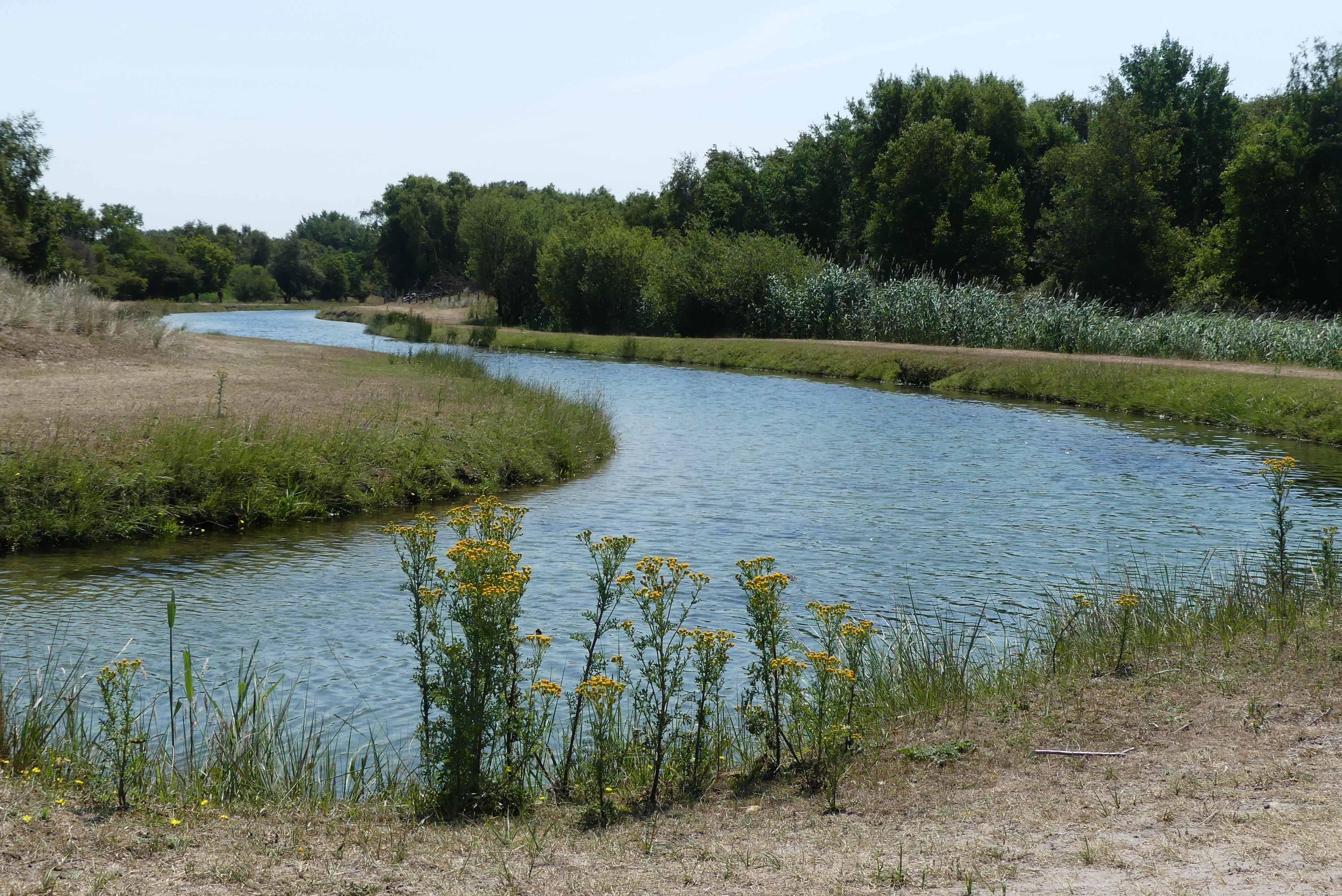 Zicht op kanaal in de Amsterdamse Waterleidingduinen